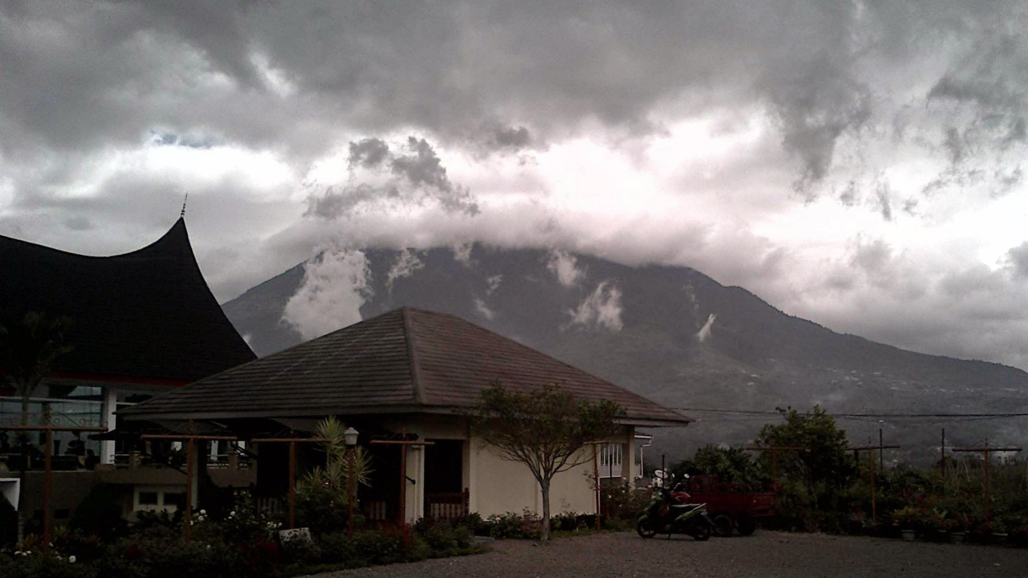 Padangpanjang